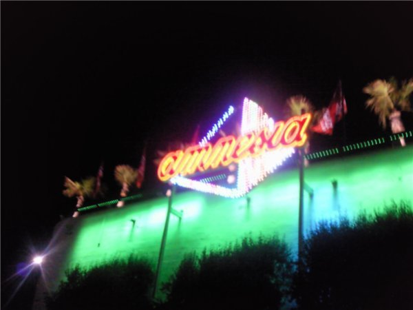 Amnesia